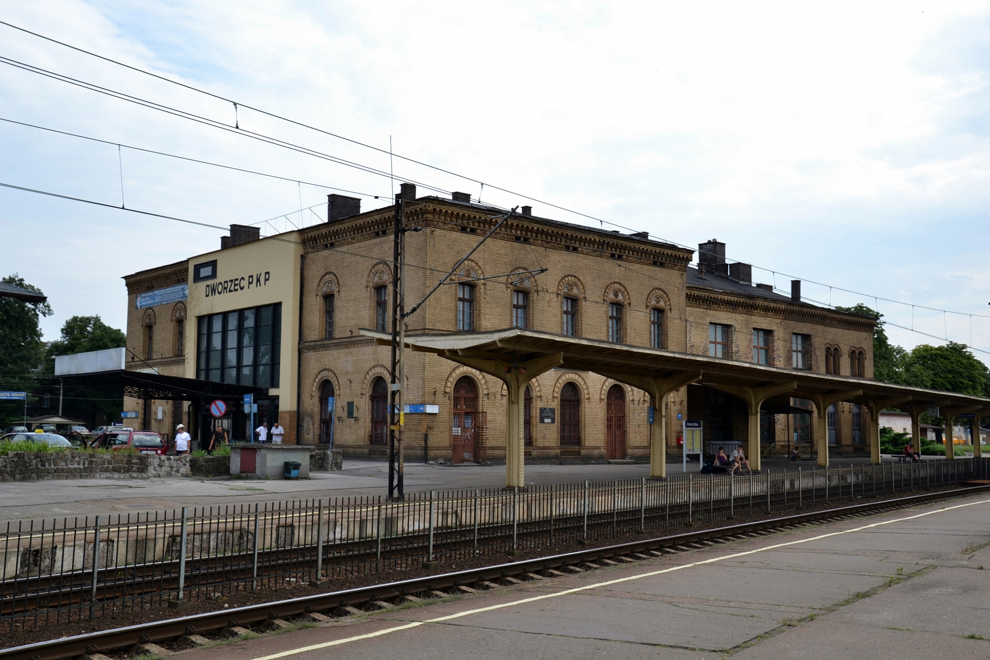 Widok dworca kolejowego w Inowrocławiu od strony peronów